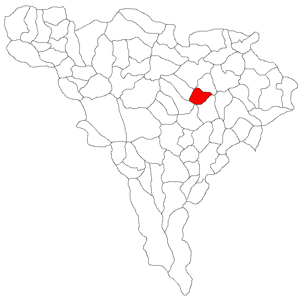 Categorie:Hărţi ale judeţului Alba